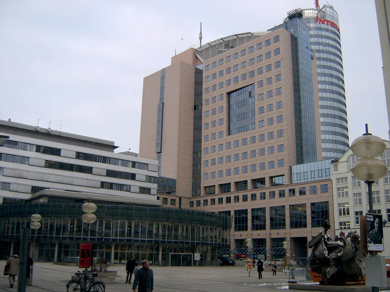 Jena, Thuringia